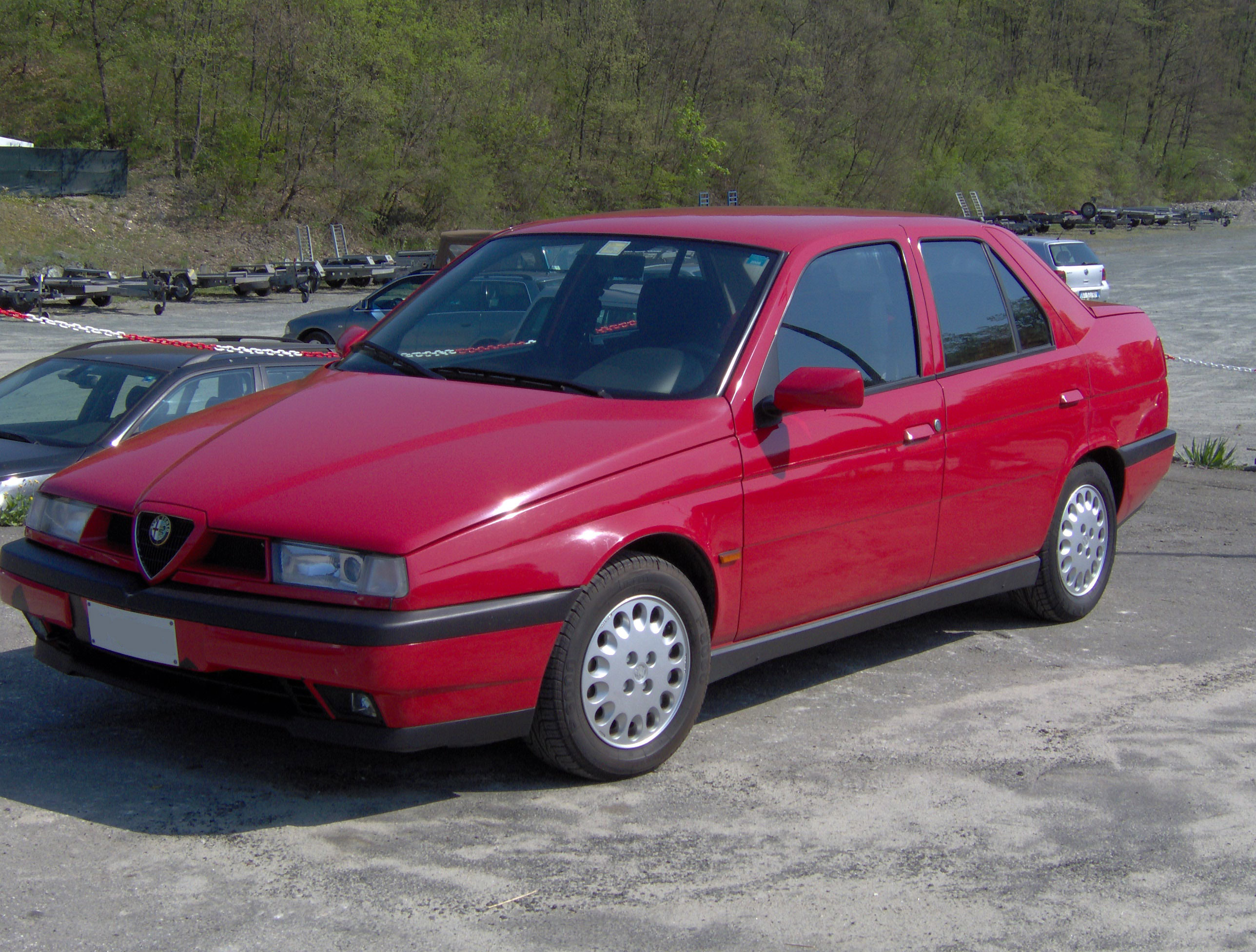 Rosso Alfa 130